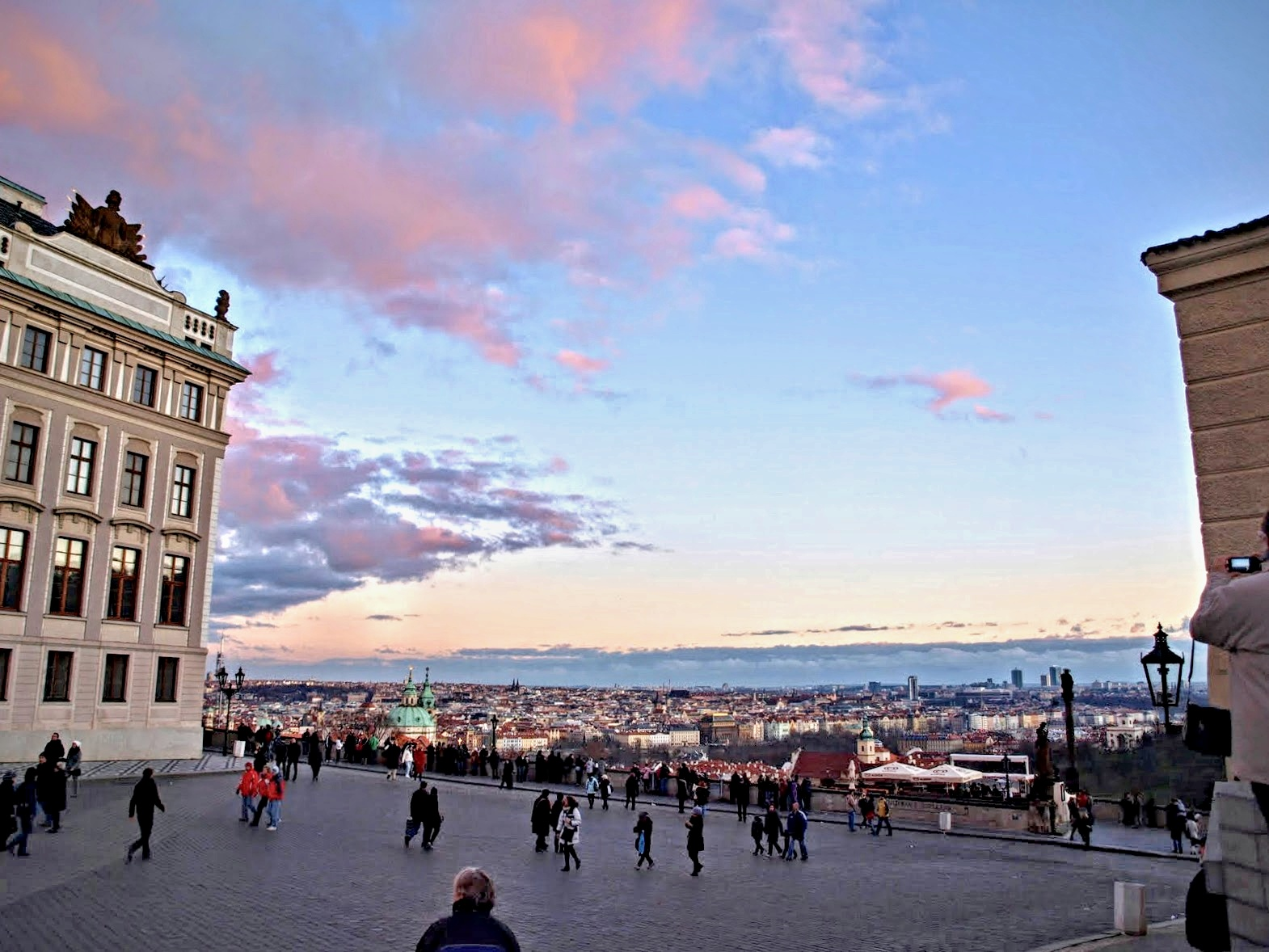 Hradčanské náměstí